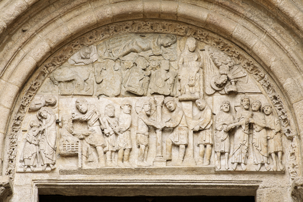 Cultural Heritage Spain RI-51-0000072